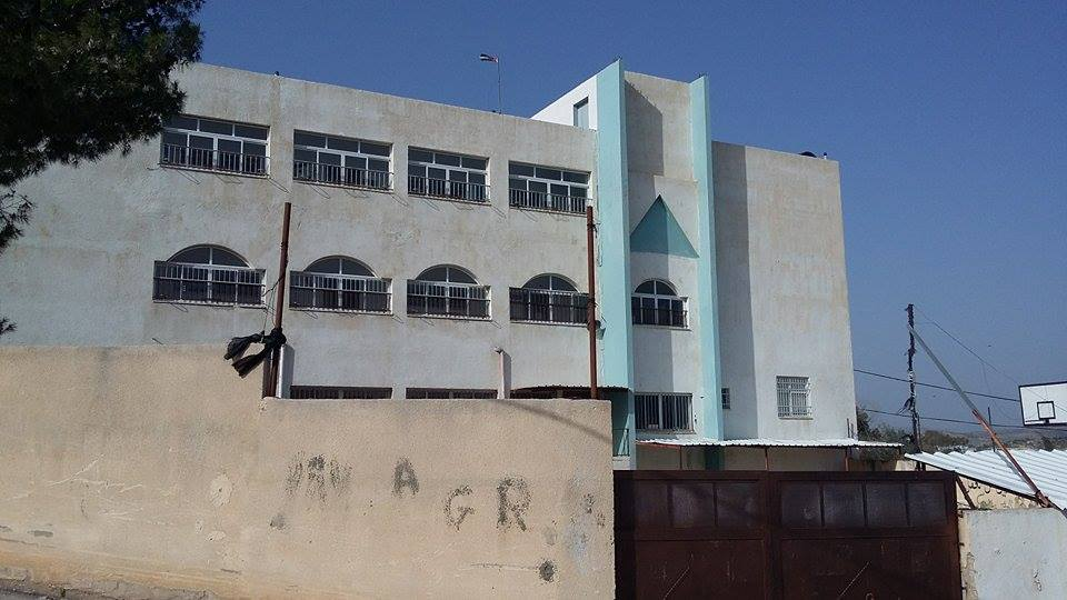 Située à l'entrée du village